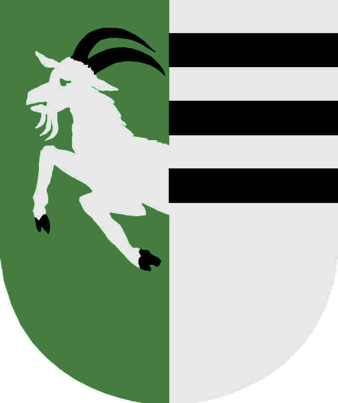 Znak obce tvoří zeleno - stříbrně polcený štít, vpravo vyniká půl stříbrného kozla s černou zbrojí, v horní části levého pole tři černá břevna jako připomínku rodu pánů z Kunštátu.